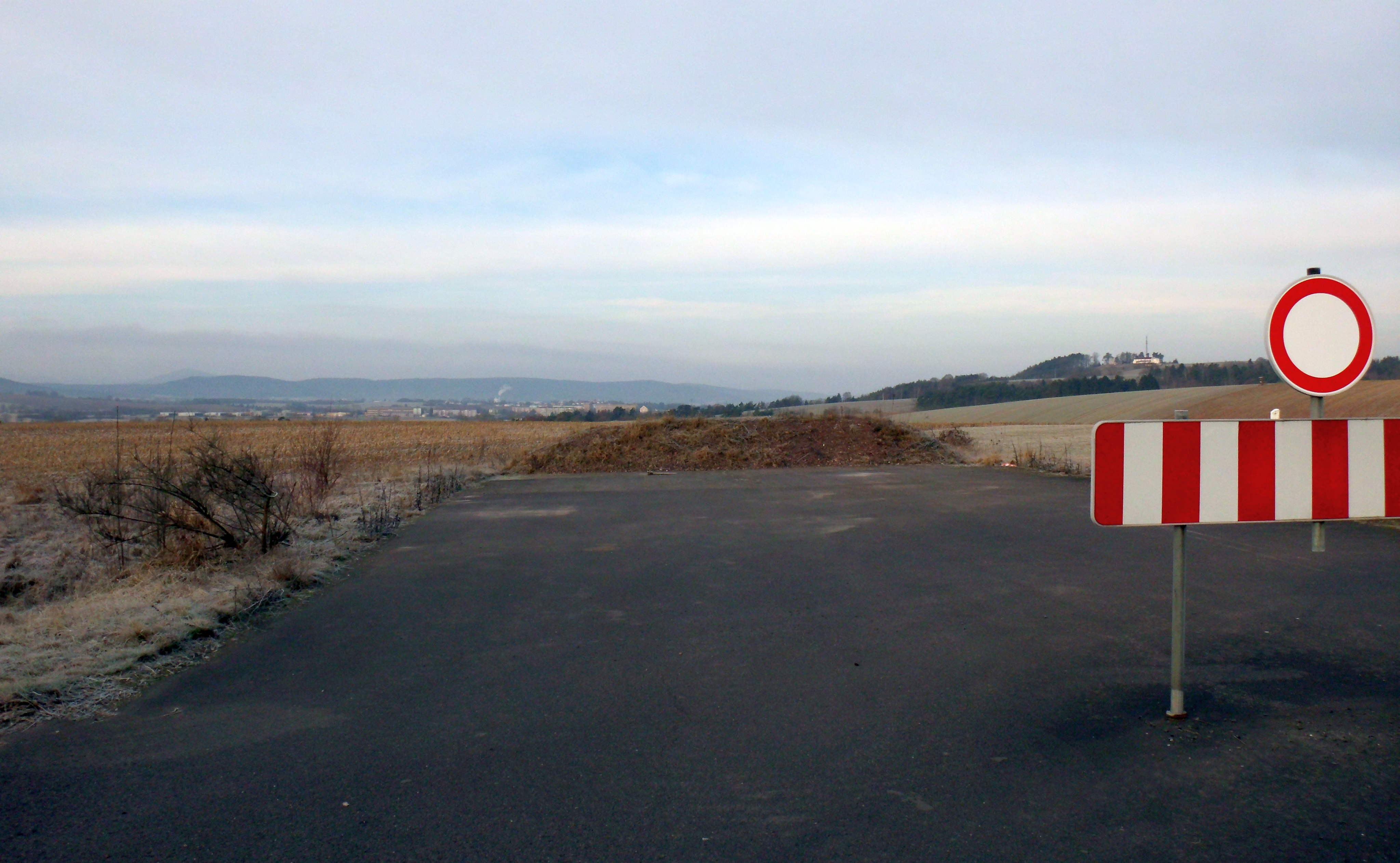 Heutiges Ende der B19/62 an der Abfahrt Barchfeld West mit Blick auf Bad Salzungen. Etwa in Höhe der Rauchfahne wird zwischen den Kasernengebäuden rechts und dem Neubaugegiet Allendorf die B62 entlangführen.